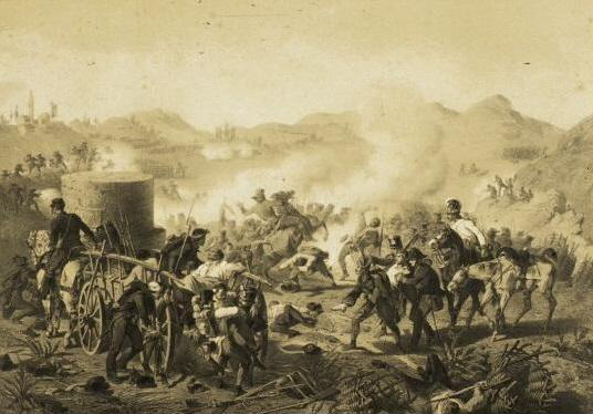 Episodio di combattimento a Rivoli del 10 giugno 1848, ridotto, litografia